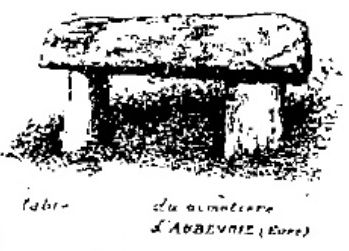 Dessin du dolmen d'Aubevoye paru en 1918 dans La chapelle de Saint-Éloi à Nassandres (Eure). Étude sur le culte des pierres, des sources et des arbres dans les départements de l’Eure, la Seine Inférieure et la Normandie de Léon Coutil